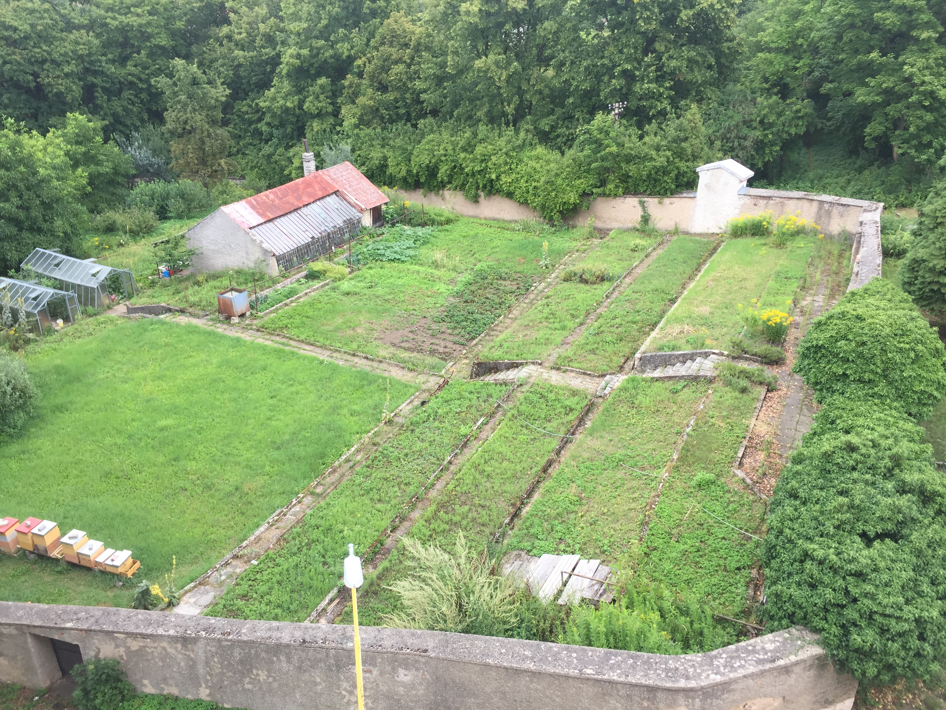 Hospodářská zahrada ke klášteru na Svaté Hoře